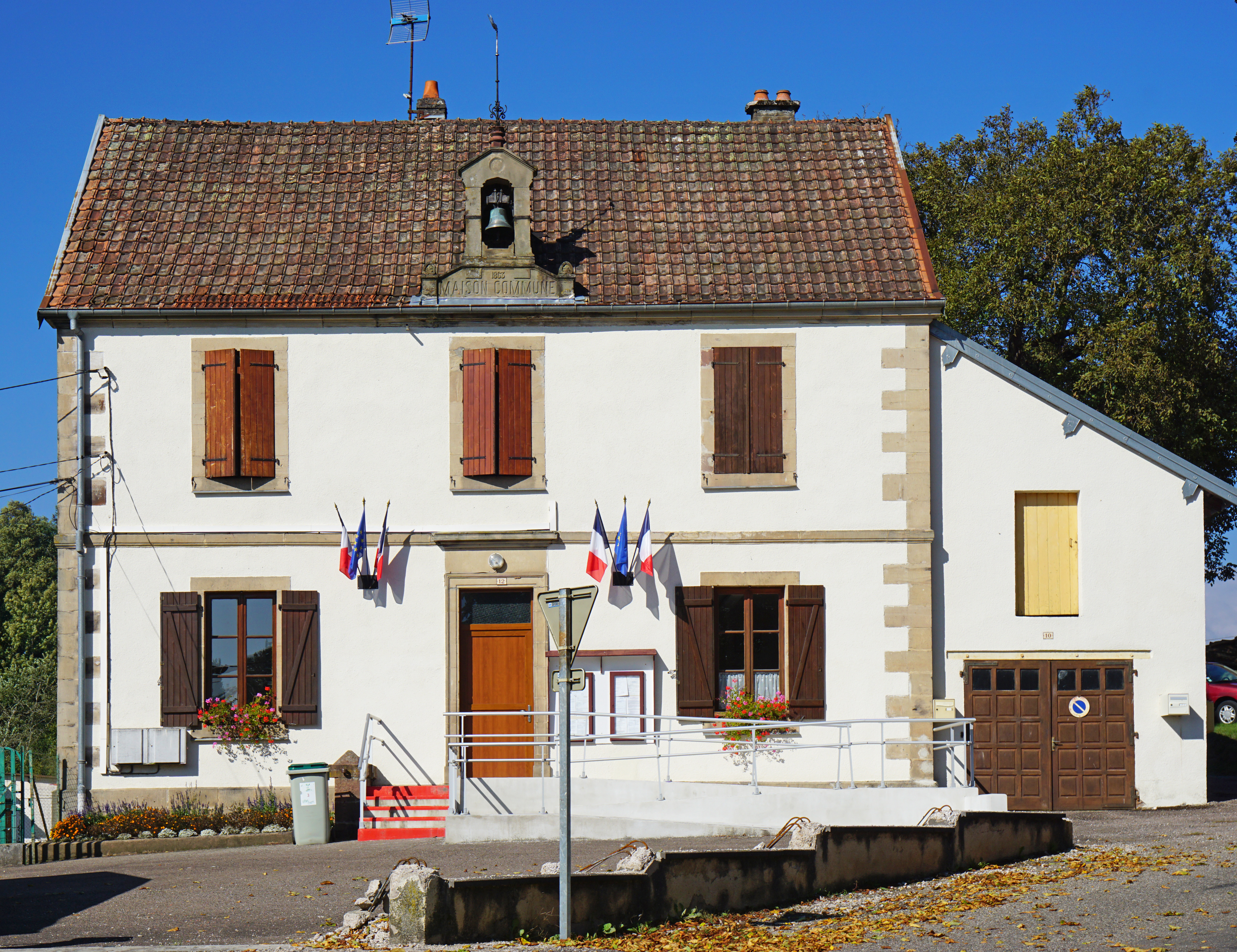 Mairie de Palante.